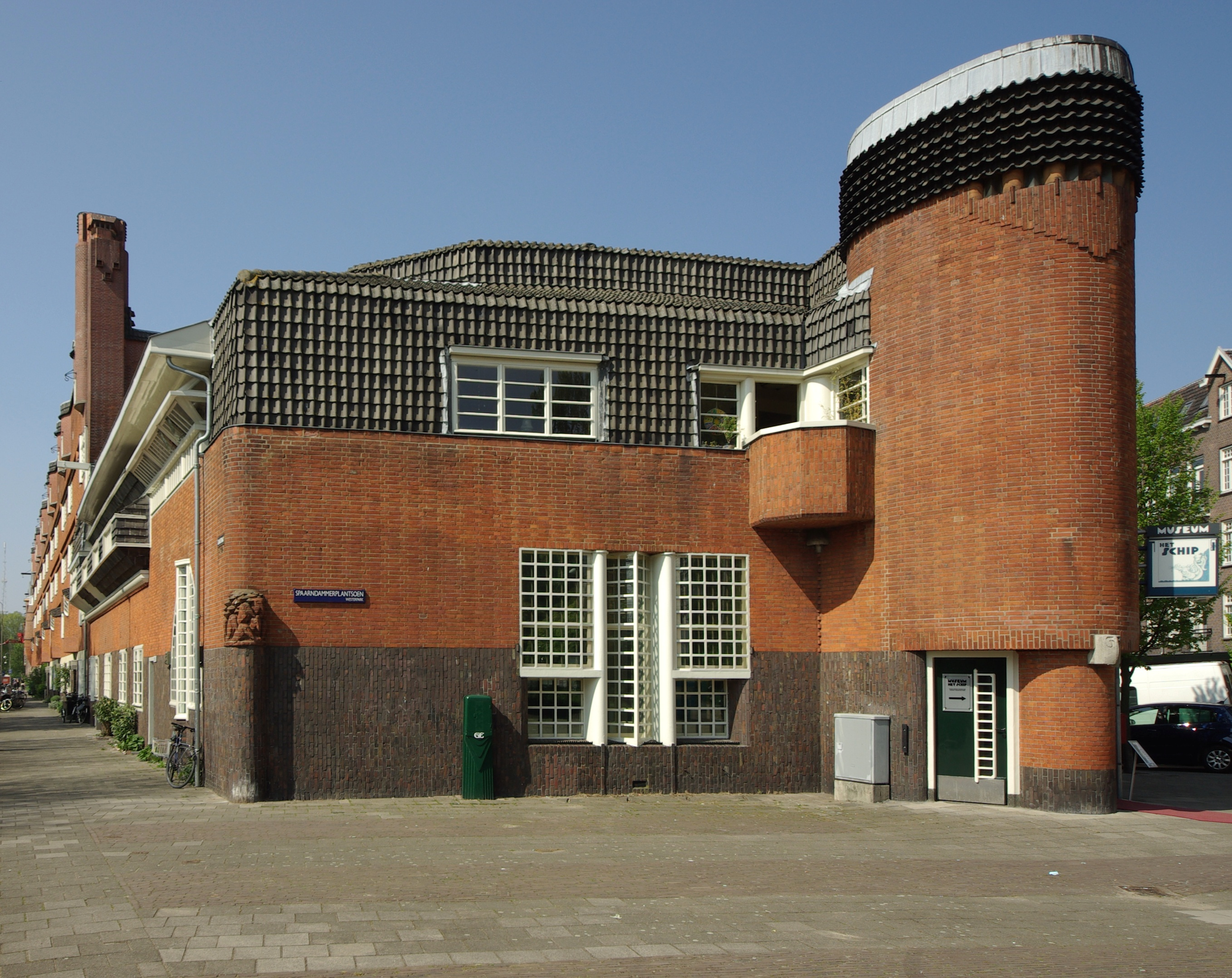 Gebouw Het Schip in Amsterdam 8″ N, 4° 52′ 27.06″ E